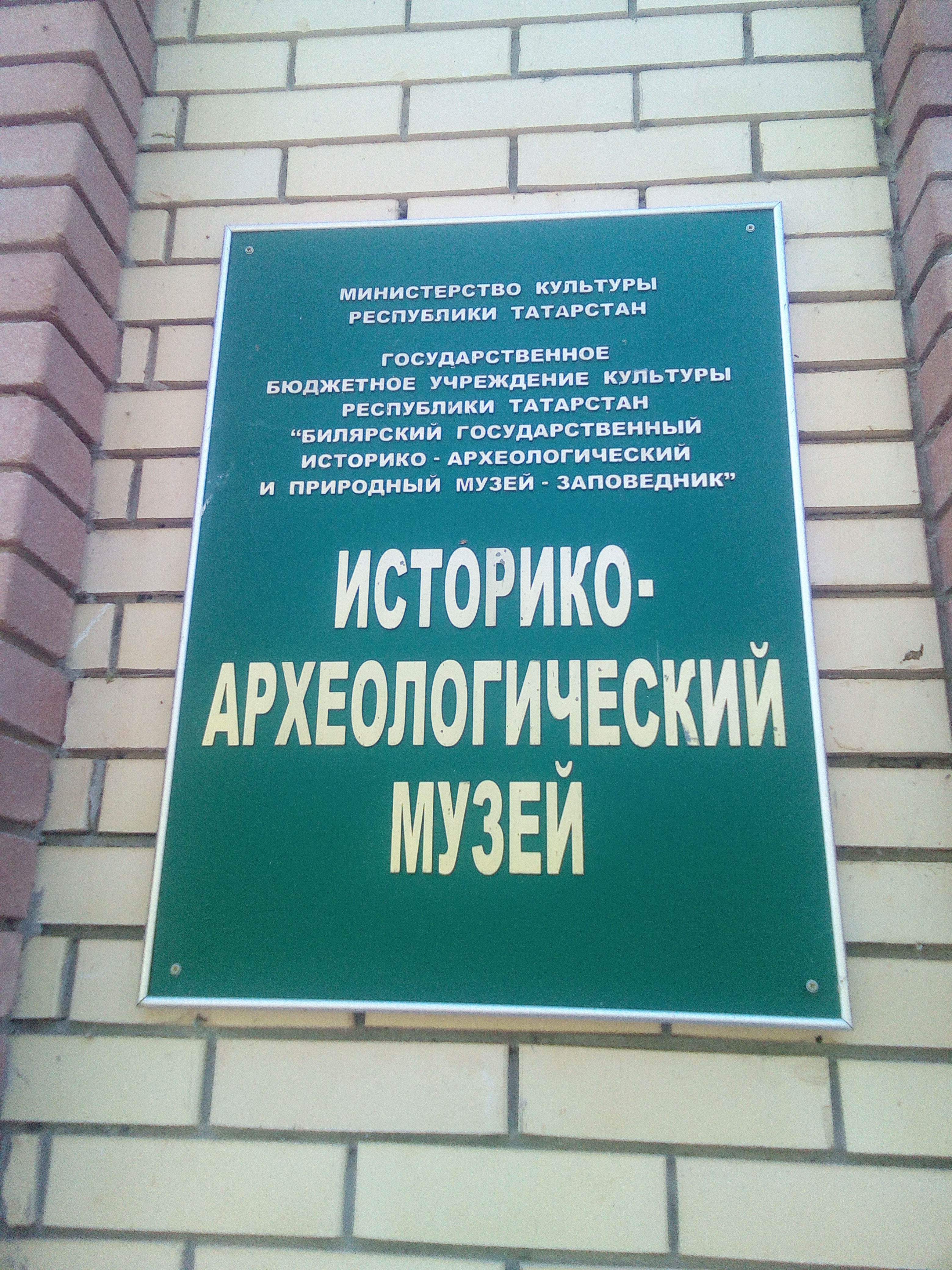 Билярский музей